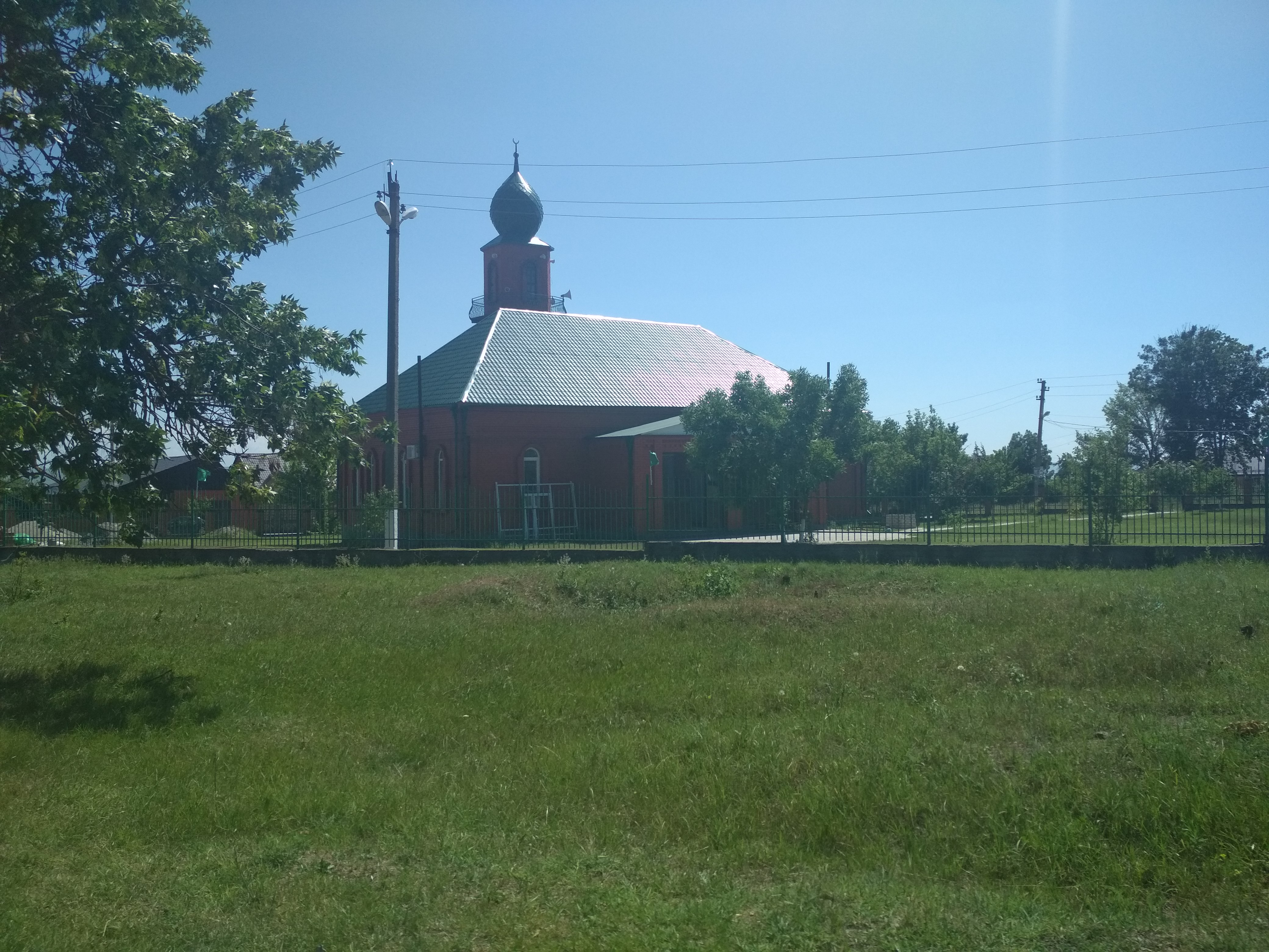 Нохчийн: Горагорскера маьждиг